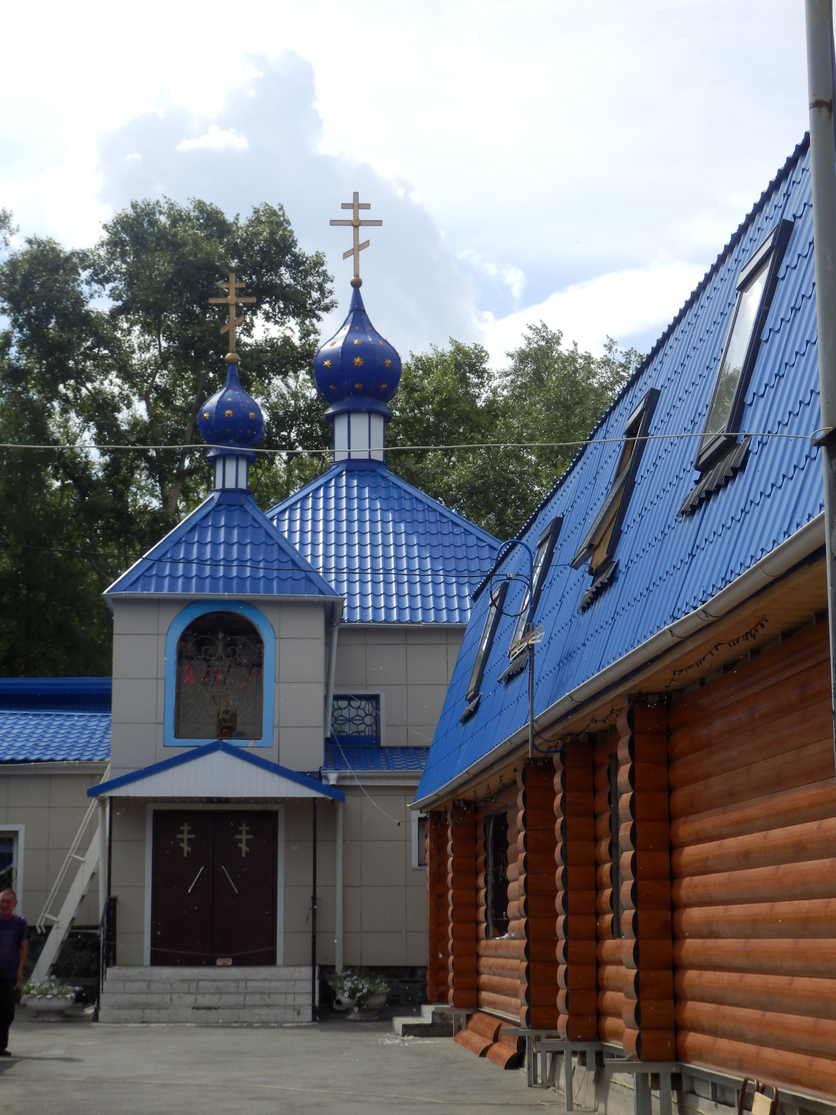 Успенская церковь недалеко от входа на Успенское кладбище